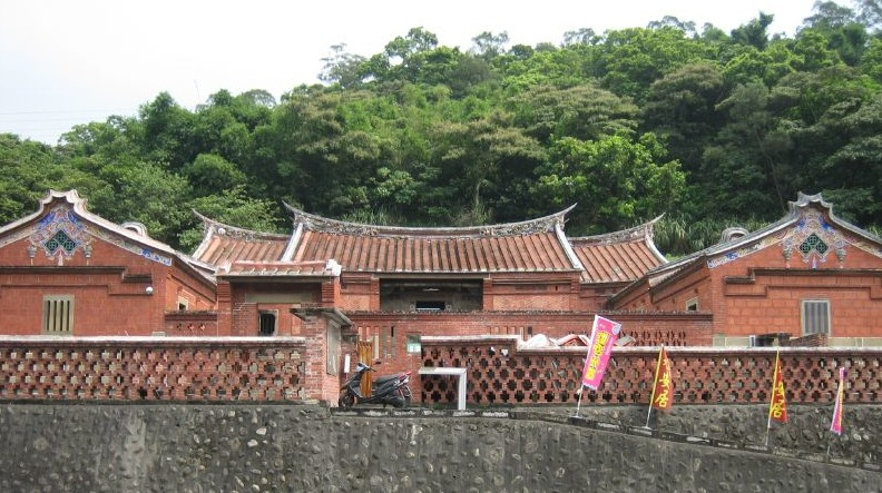 中文（台灣）: 深坑黃氏永安居。